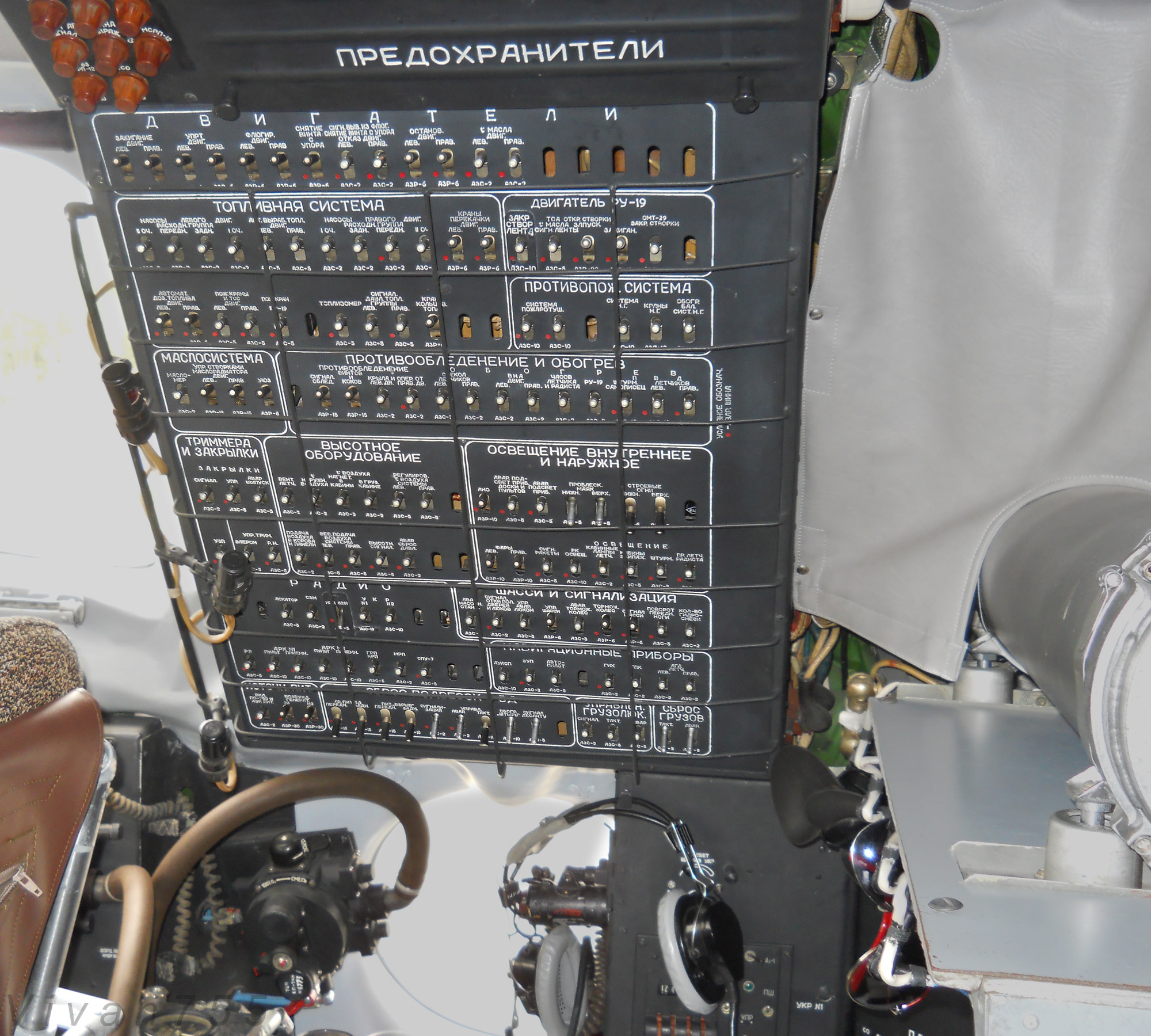 Панель автоматов защиты сети самолёта Ан-26